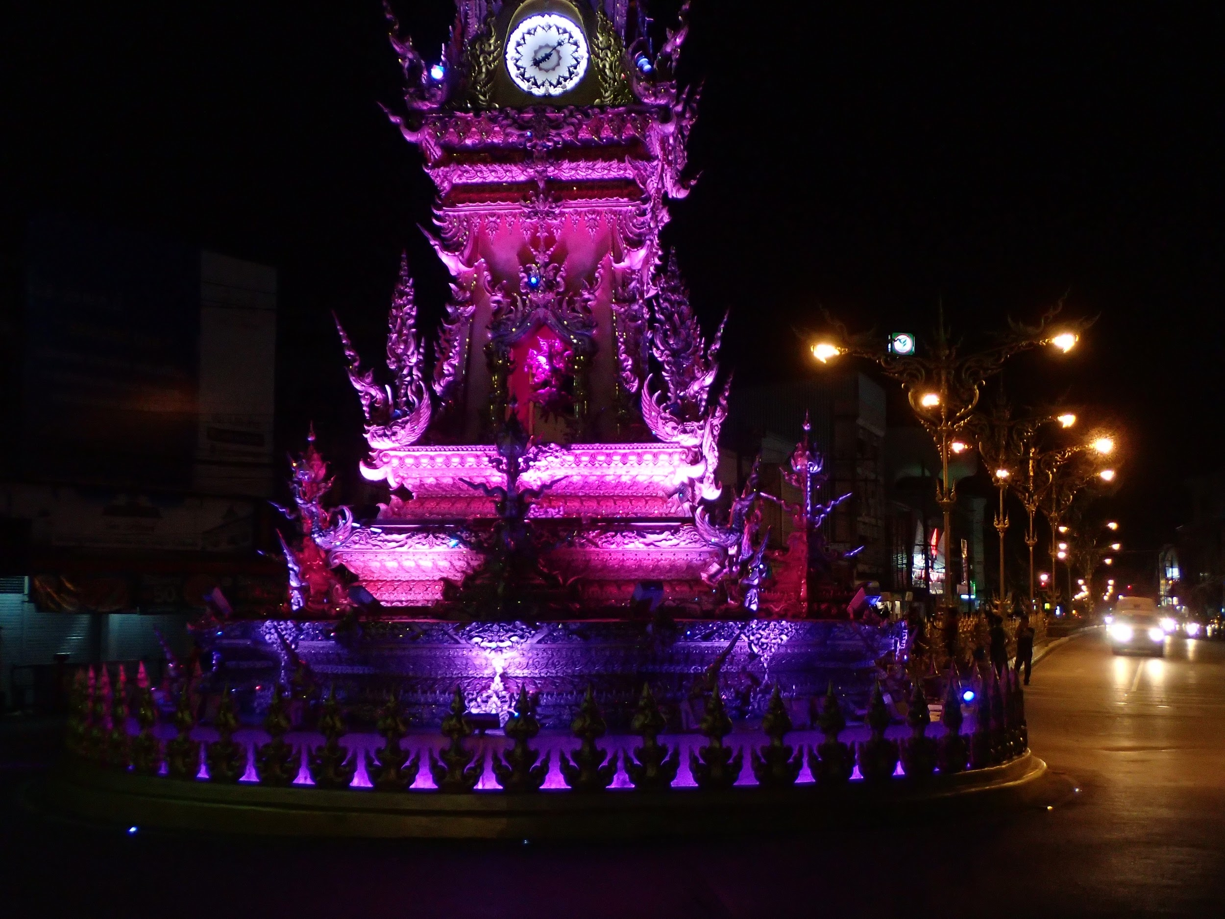 Tour de l'horloge à Chiang Rai de nuit, lumière violette